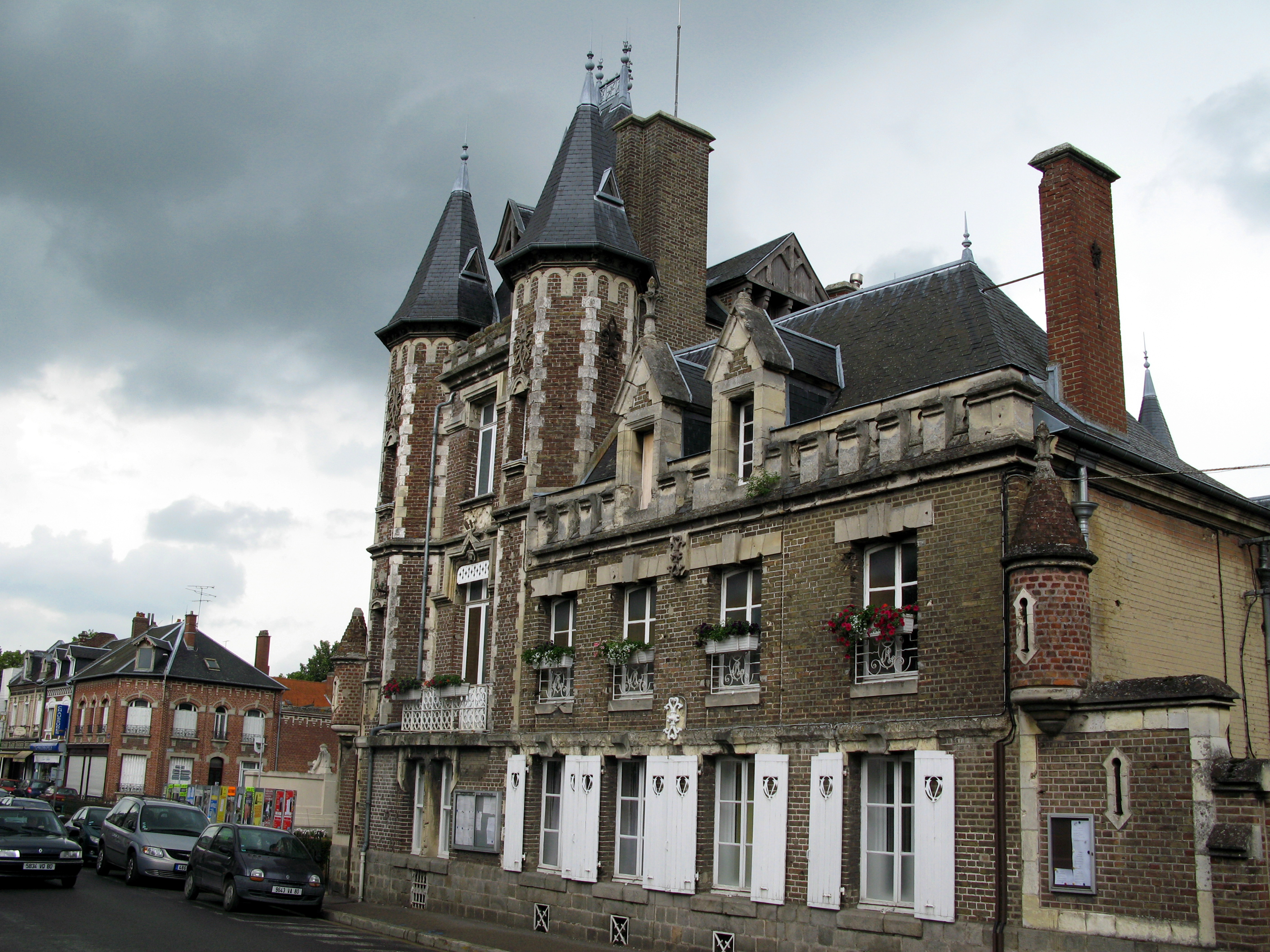 Corbie (Somme, France) - Façade ouest de la mairie. Rue Faidherbe et son prolongement rue Marcellin Truquin (vue vers le Nord). Le monument aux morts est ici à gauche, au-delà de la mairie avec ses tourelles.